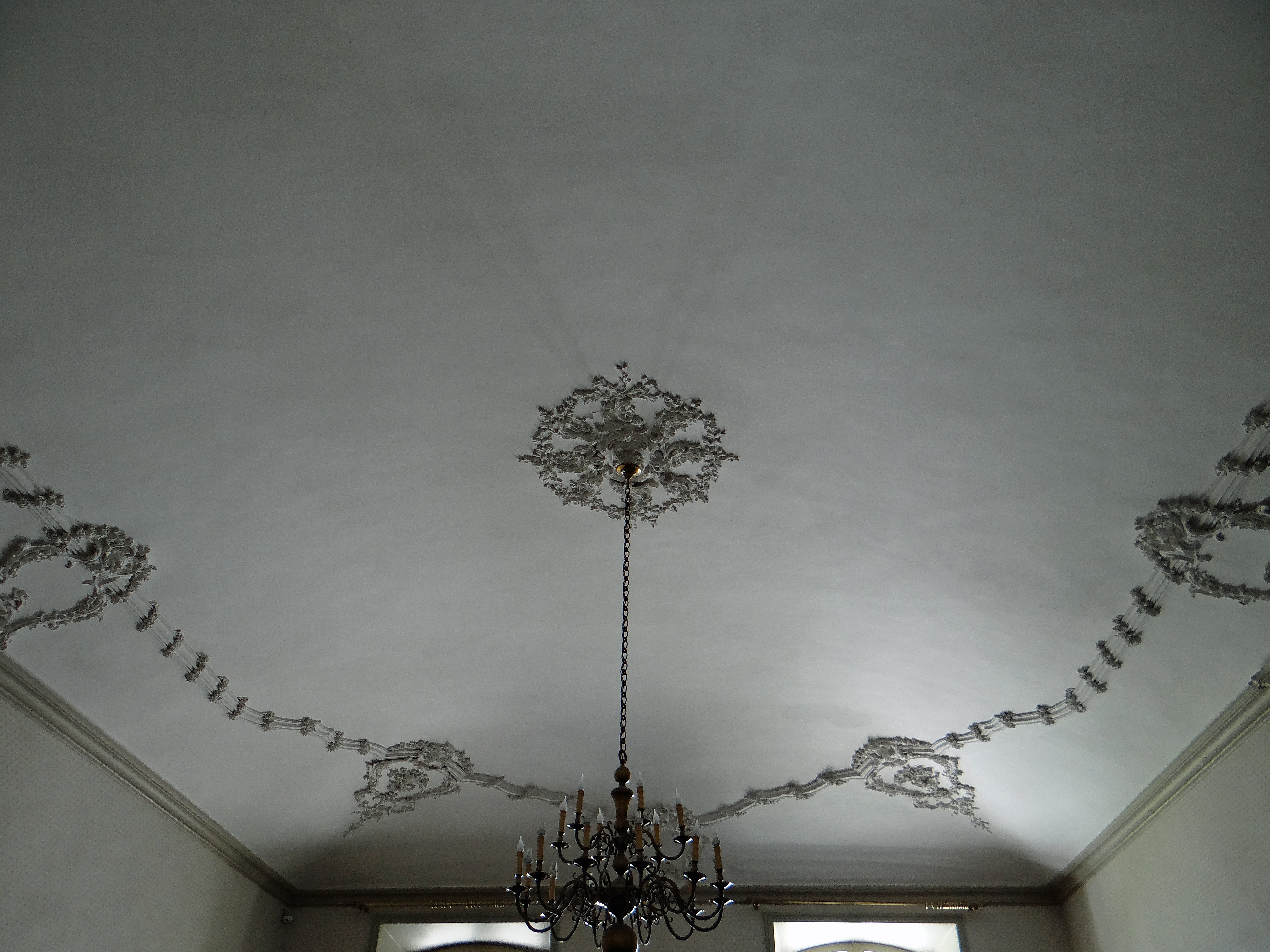 Viviers - Palais épiscopal, actuelle mairie - Plafond de l'ancienne salle à manger